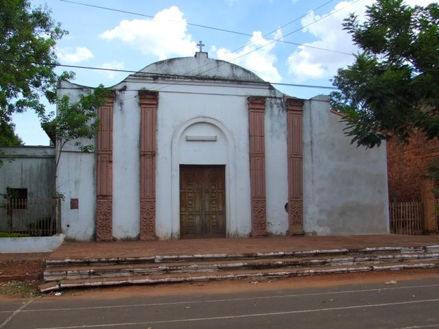 Iglesia Virgen de Loreto, en Santa Rosa (Paraguay).